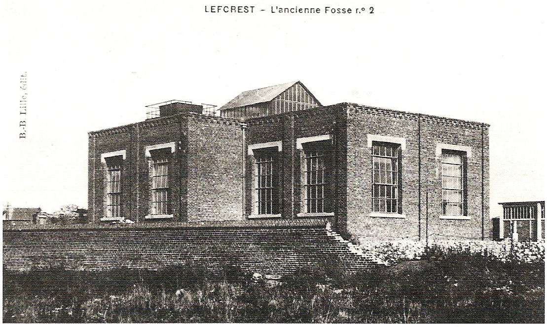 La Fosse n° 2 de la Compagnie des mines de l'Escarpelle était un charbonnage constitué d'un seul puits situé à Leforest, Pas-de-Calais, Nord-Pas-de-Calais, France. La photographie a été prise après la reconstruction de la fosse.